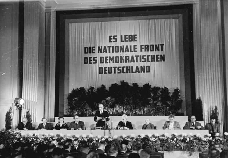 ADN-ZB-Kolbe Berlin: Gründung der DDR am 7.10.1949 Im Gebäude der DWK (Deutsche Wirtschaftskommission) in der Leipziger Straße fand am 7.10.49 die 9. Tagung des Deutschen Volksrates statt, auf der das Manifest der Nationalen Front des demokratischen Deutschland verkündet wurde. Der Deutsche Volksrat wurde zur Provisorischen Volkskammer umgebildet und die Deutsche Demokratische Republik gegründet. - Konstituierende Sitzung der Provisorischen Volkskammer. V.l.n.r.: Erich Geske, Herbert Hoffmann, Friedel Malter, Jonny Loehr, Johannes Dieckmann, Hemann Matern, Hugo Hickmann, Elli Schmidt, Friedrich Ebert.